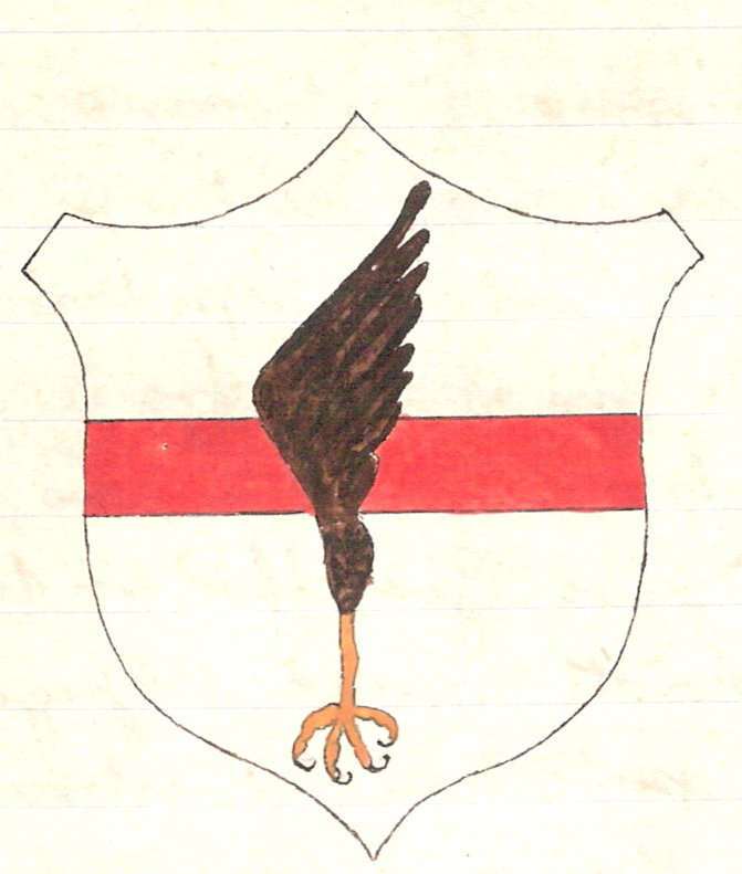 Stemma della Famiglia Agostini. Biblioteca Nazionale Marciana - estratto dal Cappellari: Il Campidoglio Veneto